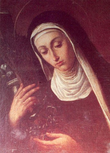 Sainte Eustochia Smeraldo Calafato